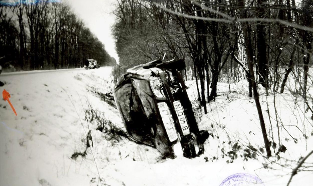 Masina lui Dumitru Tinu